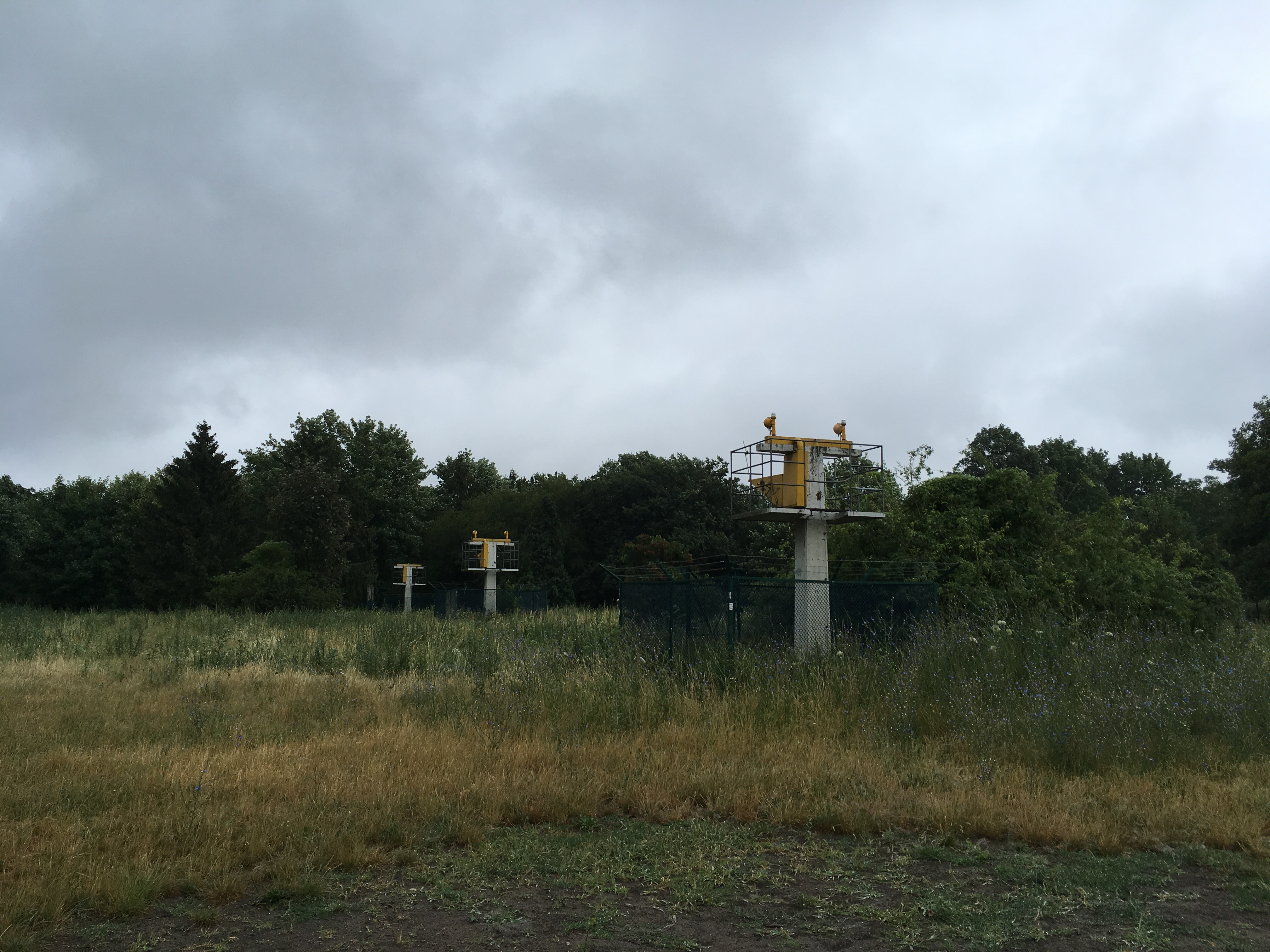 Anita-Berber-Park in Berlin-Neukölln